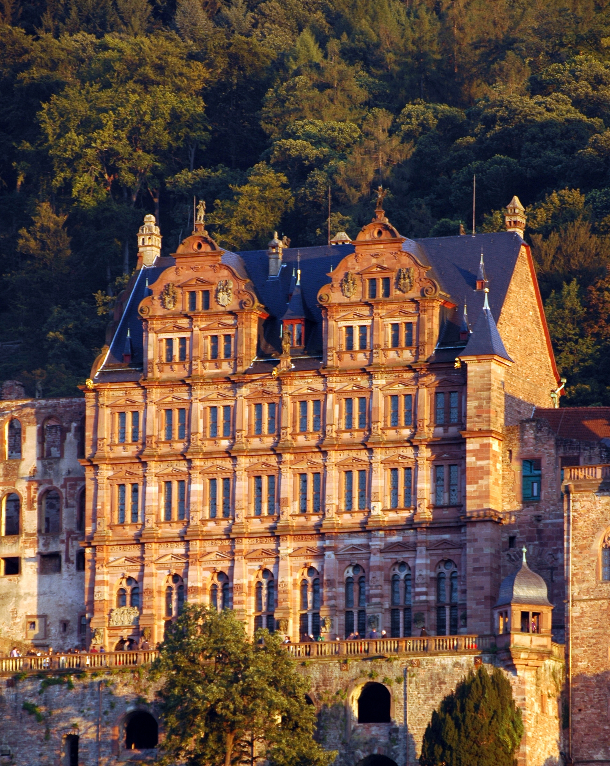 Schloss Heidelberg